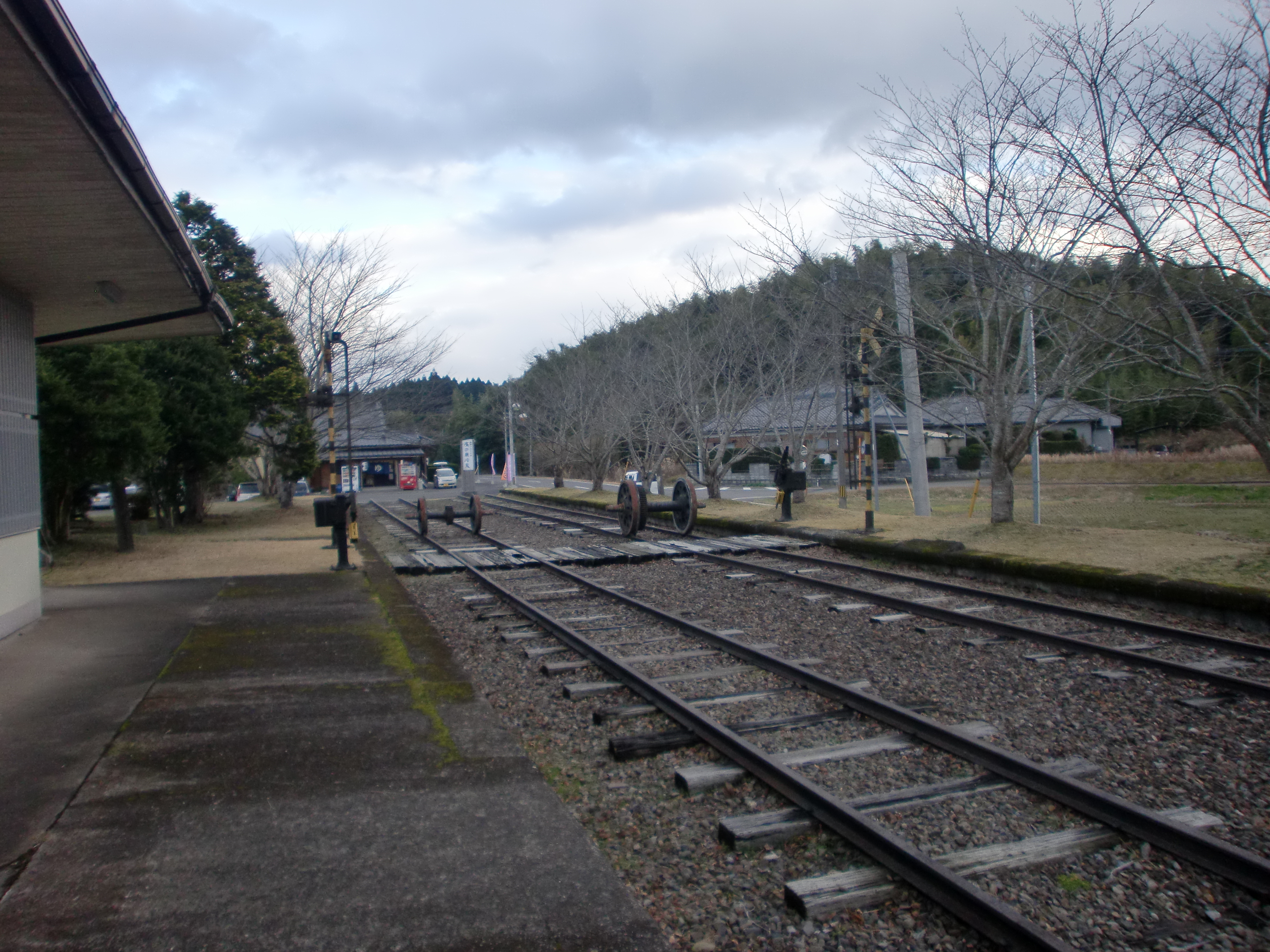 樋脇駅跡のホーム及び動輪、踏切のモニュメント。